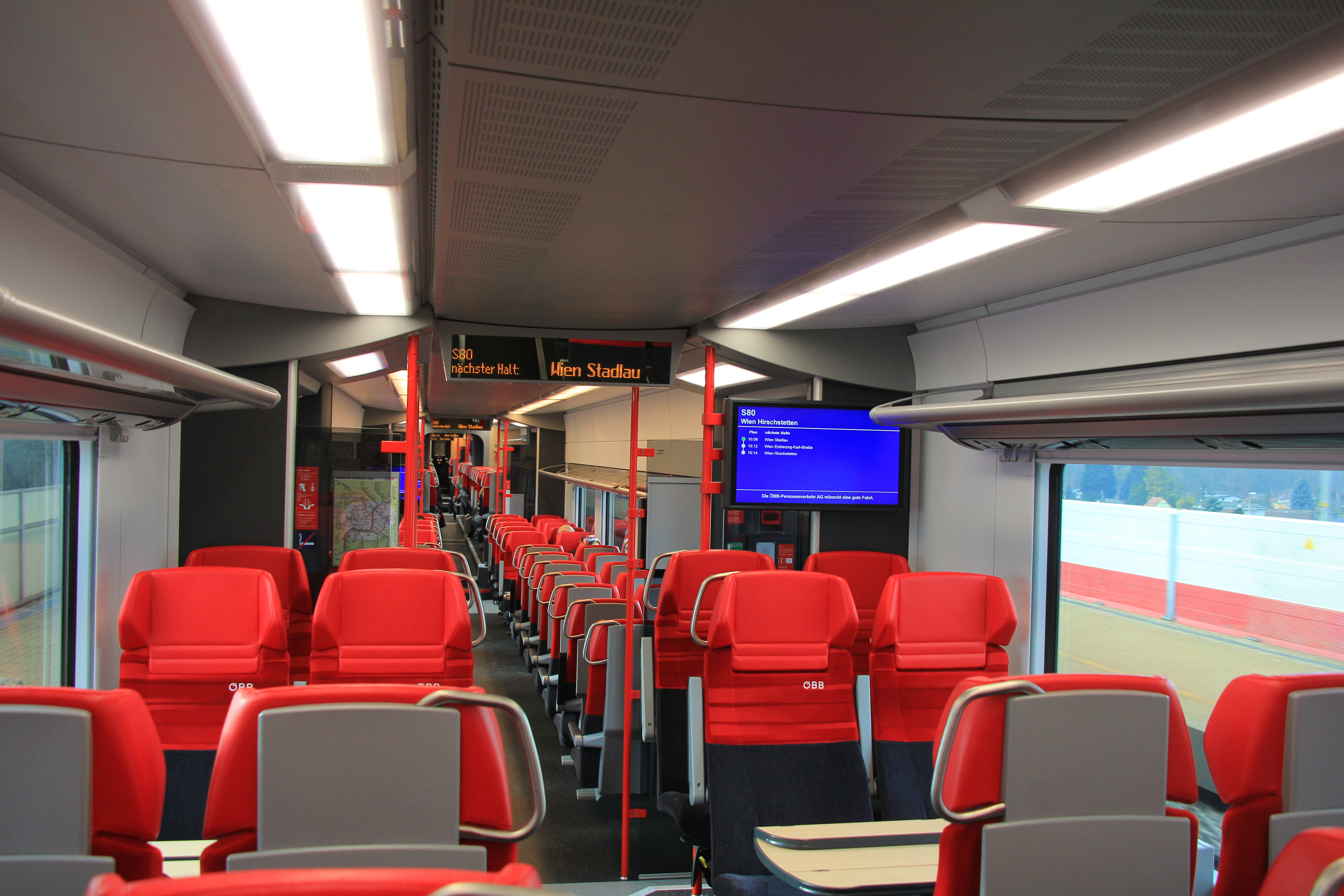 Im Inneren des Cityjet der ÖBB auf der Schnellbahn S80